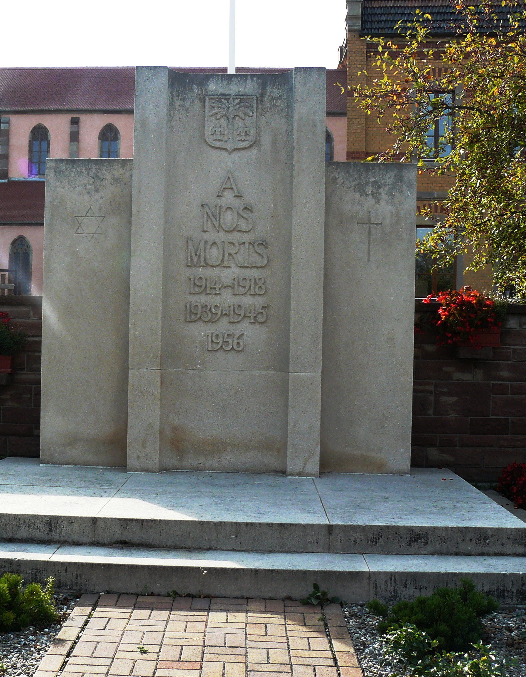 Le monument aux mort de Mackenheim